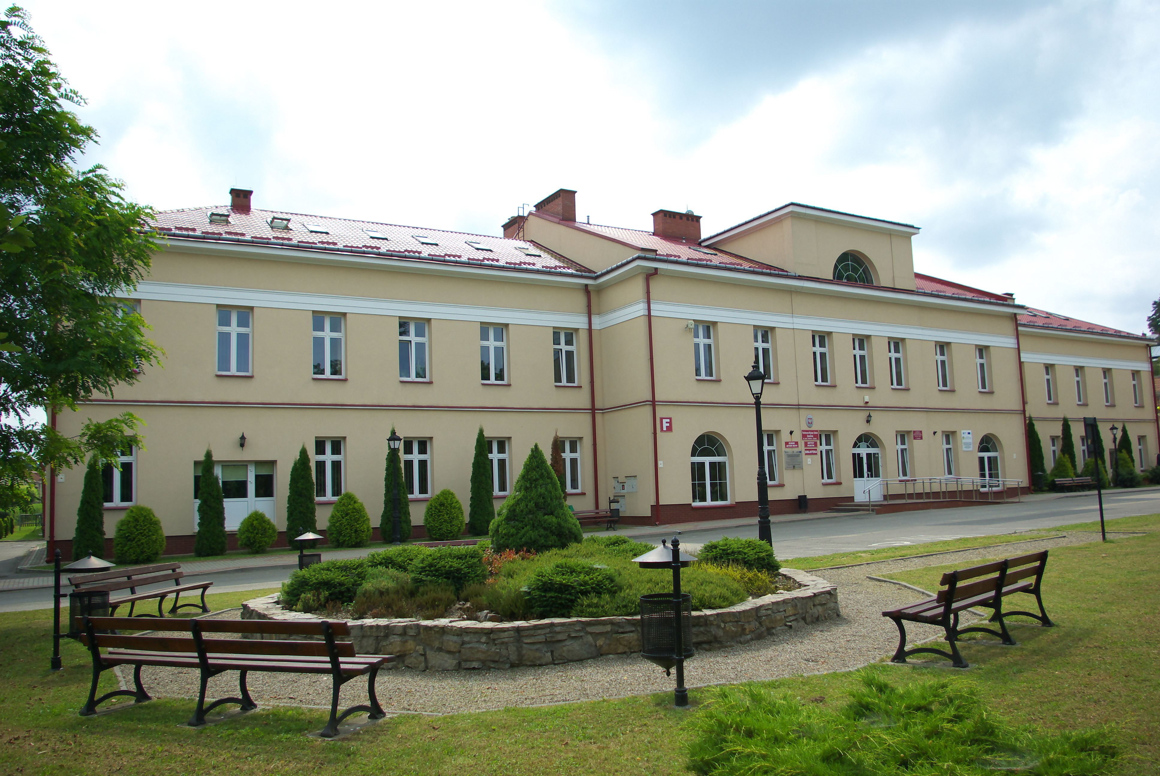 Budynek przy ul. Mickiewicza 21 (F) w Sanoku